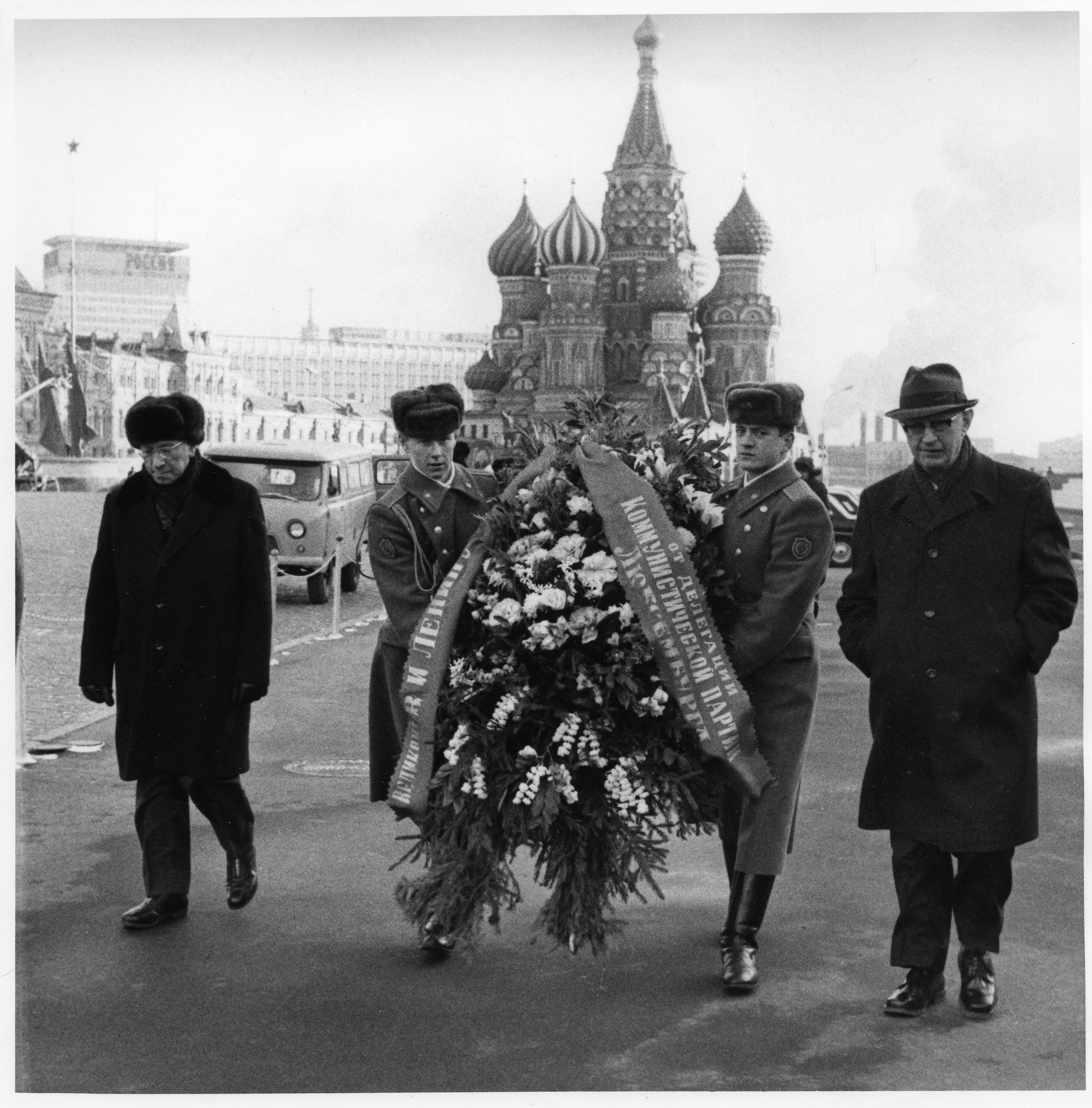 Den Dominique Urbany bei enger Kranznéierleeung zu Moskau, 1972.